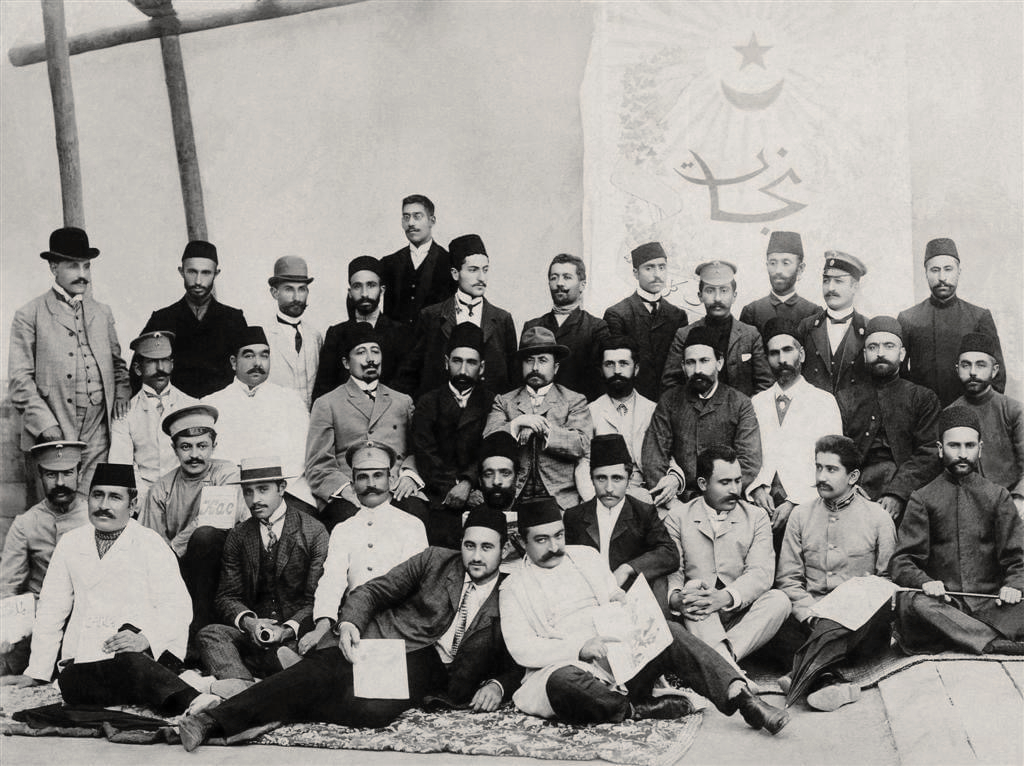 Nicat Cəmiyyətinin üzvləri. Birinci sırada, soldan: Əbdürrəhim bəy Haqverdiyev, Mirzə Ələkbər Sabir, Haşım bəy Vəzirov|Həşim bəy Vəzirov İkinci sırada, sağdan: 4-cü Əli bəy Hüseynzadə, 5-ci Həsən bəy Ağayev, 7-ci Mahmud bəy Mahmudbəyov Aşağı sırada, soldan: 4-cü Üzeyir bəy Hacıbəyov 5-ci Süleyman Sani Axundov Aşağı sırada, sağdan: 4-cü Abdulla Şaiq